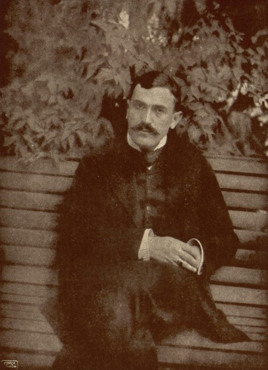 zdjęcie Tadeusz Boy-Żeleński